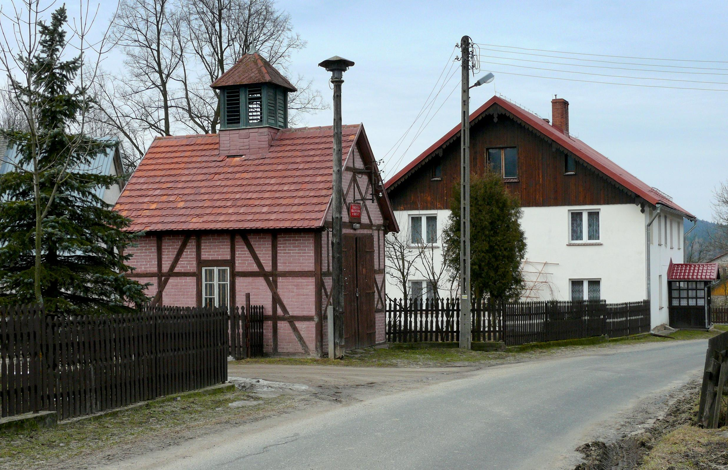 Środkowa część wsi z budynkiem Ochotniczej Straży Pożarnej